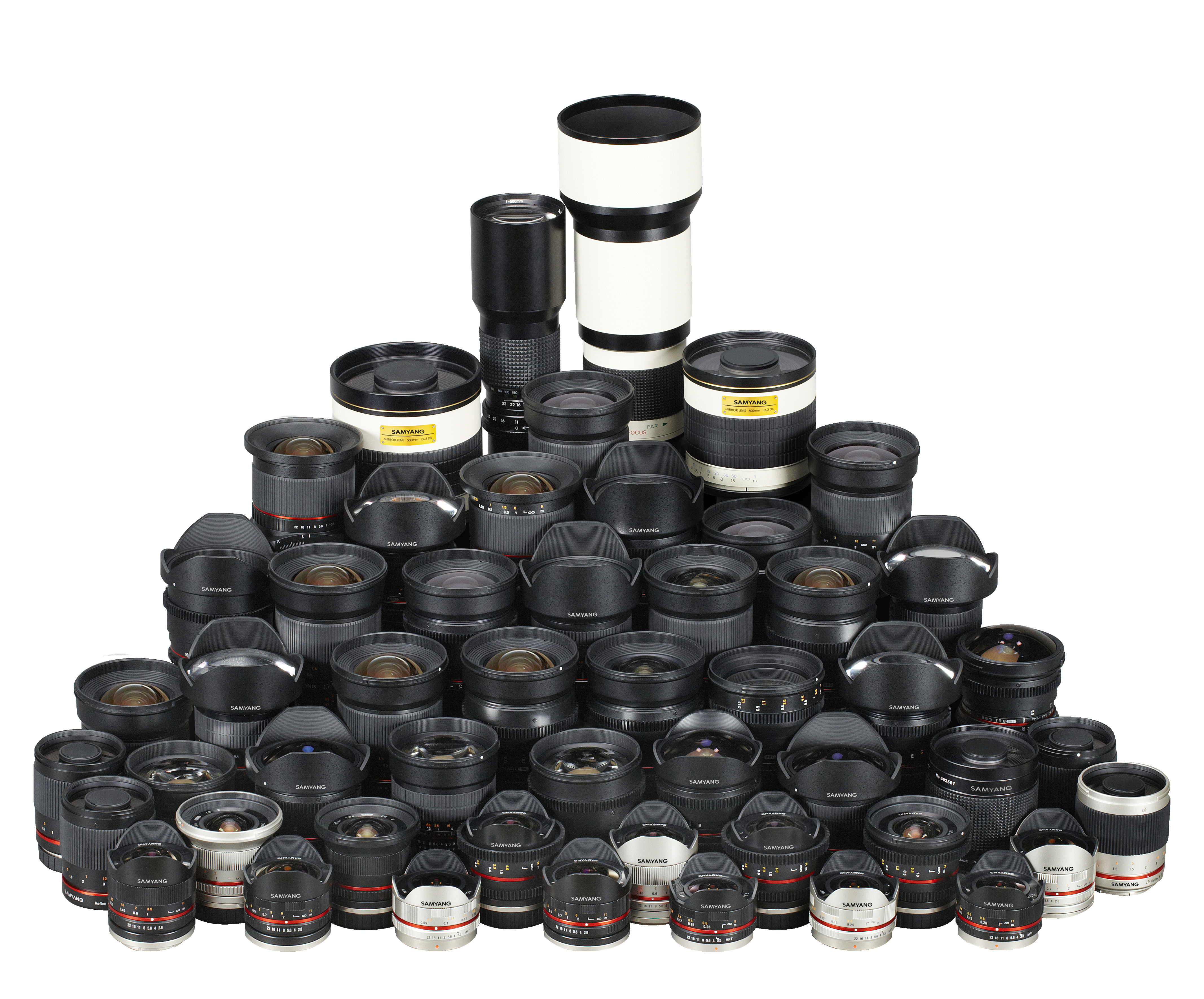 9개의 마운트에 대응하는 삼양옵틱스 MF 렌즈 라인업